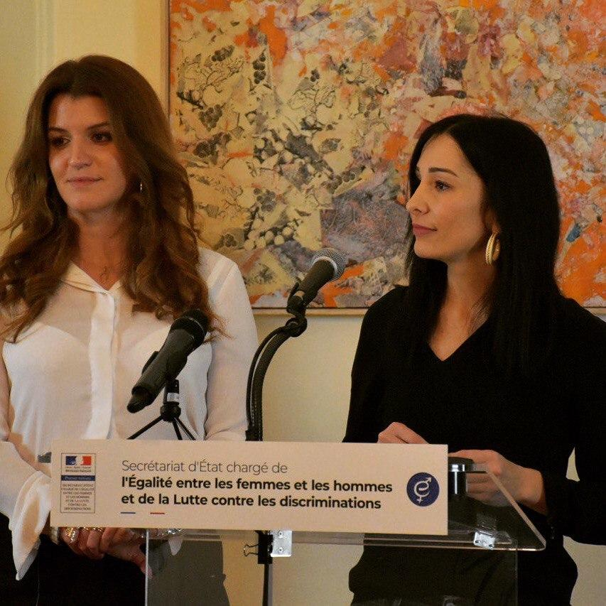 Le 27 janvier 2020, remise de la lettre de mission d'Alexandra Louis par Marlène Schiappa pour évaluer la loi renforçant la lutte contre les violences sexistes et sexuelles